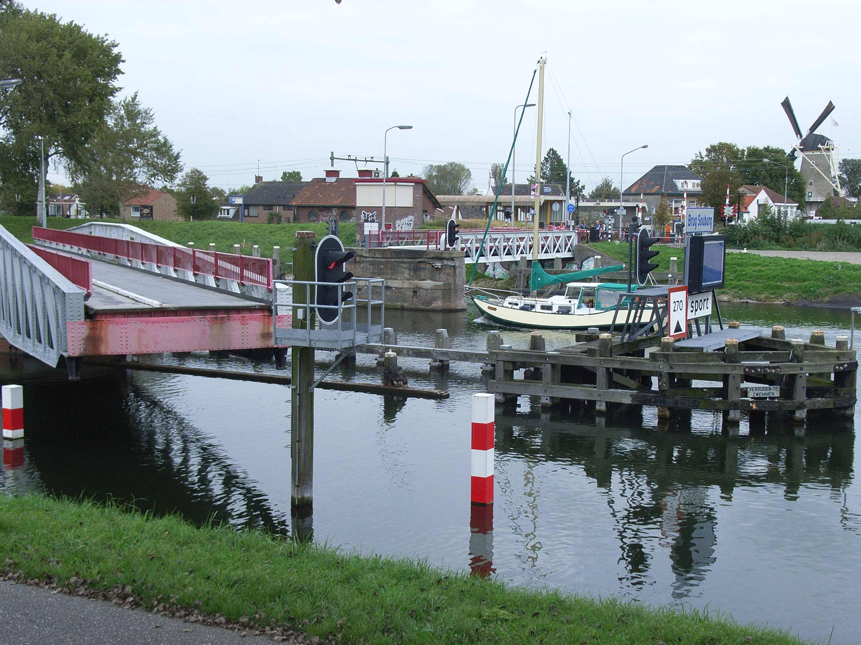 Kanal door Walcheren, Drehbrücke bei Oost Souburg (NL)